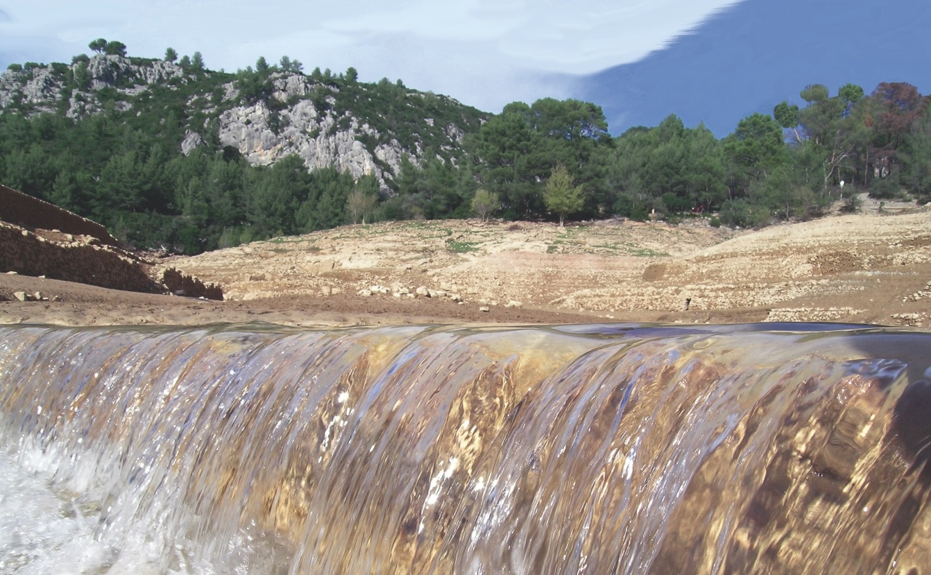 Sources situées sous la retenue de Dardennes